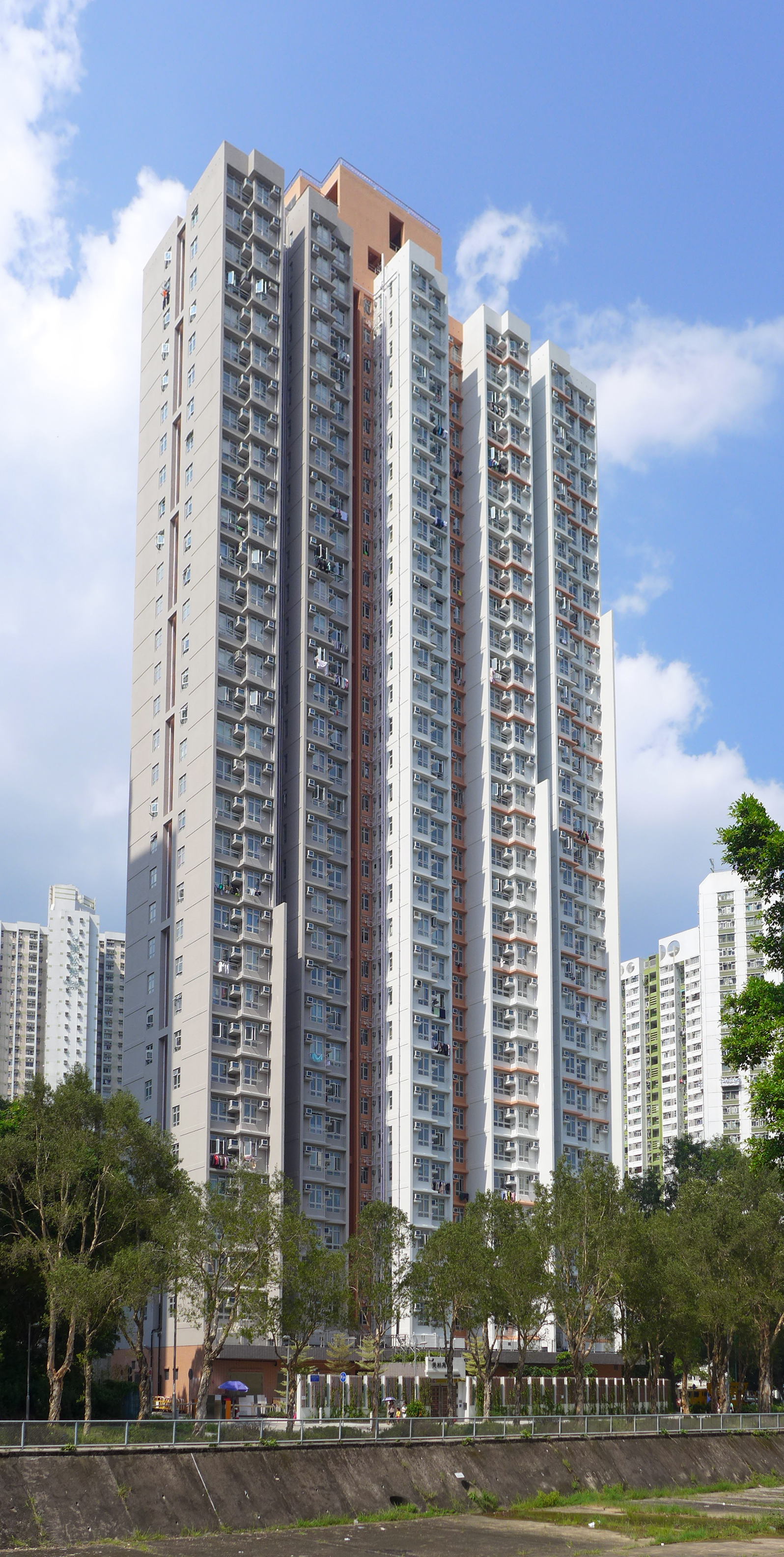 Mei Pak Court